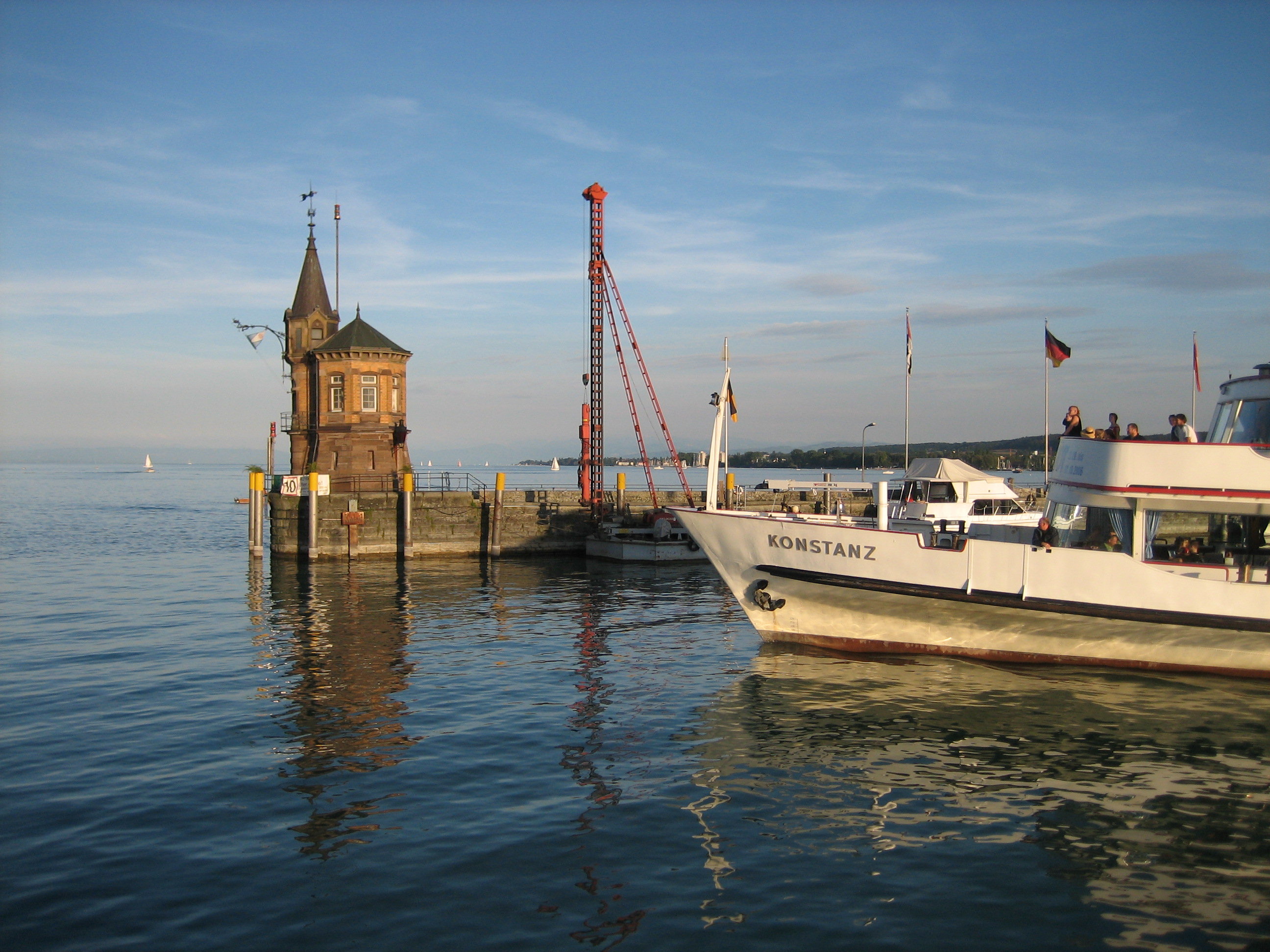 Das Motorschiff Konstanz verlässt den Hafen von Konstanz. Bildhintergrund: Historischer Hafenturm